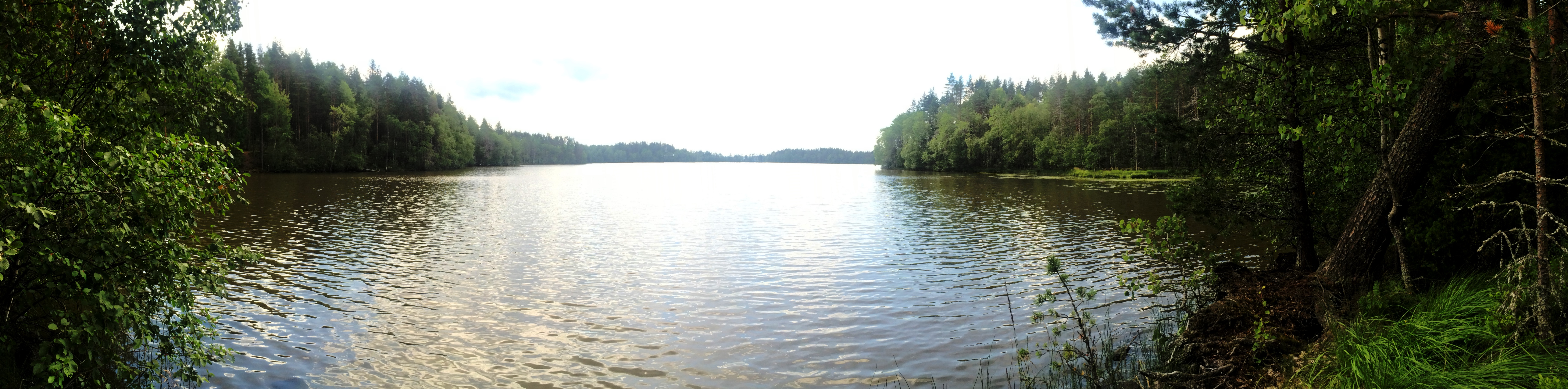 Вохтозеро (озеро, Кондопожский район)